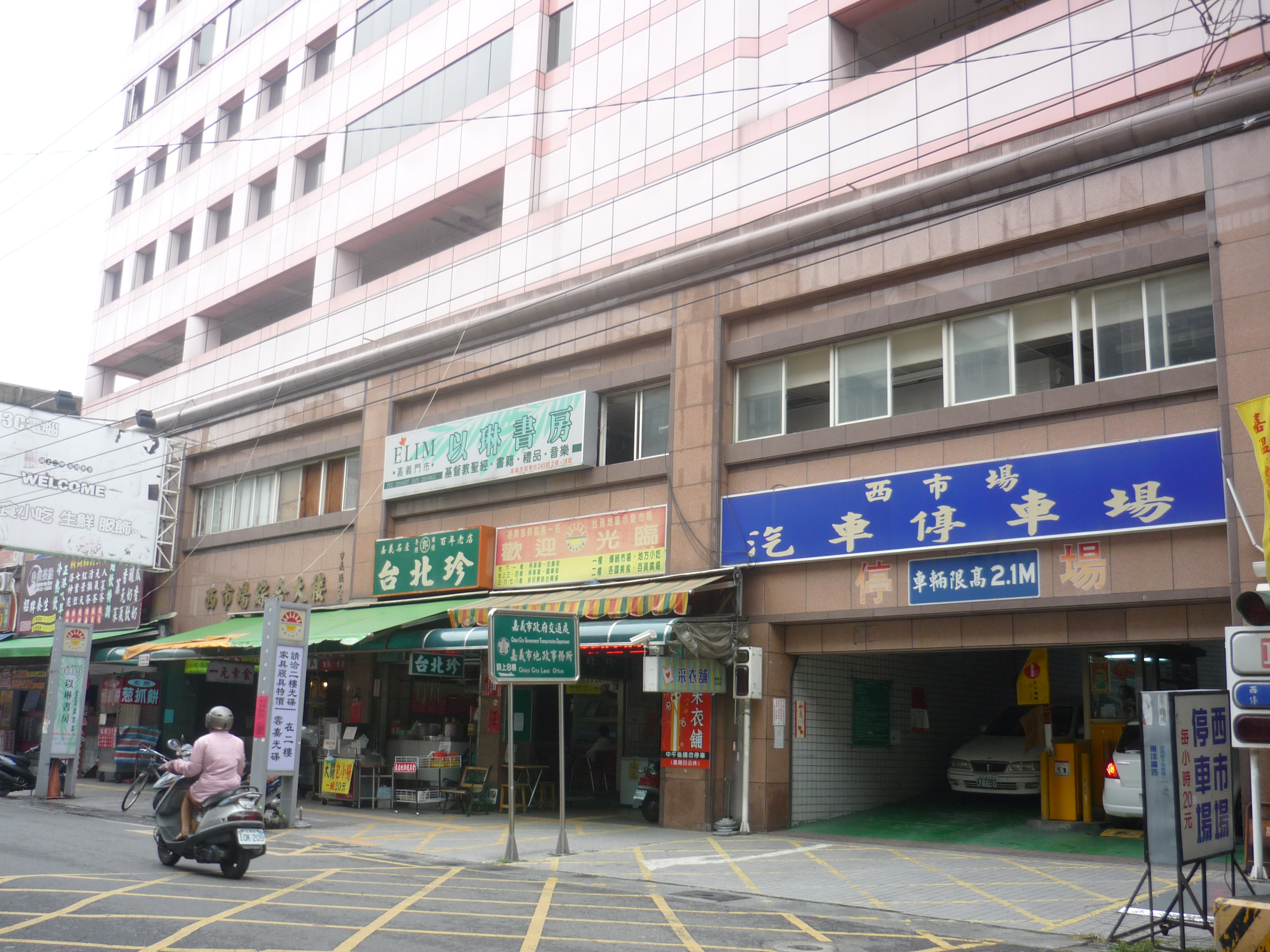 中文（台灣）: 嘉義市西市場綜合大樓